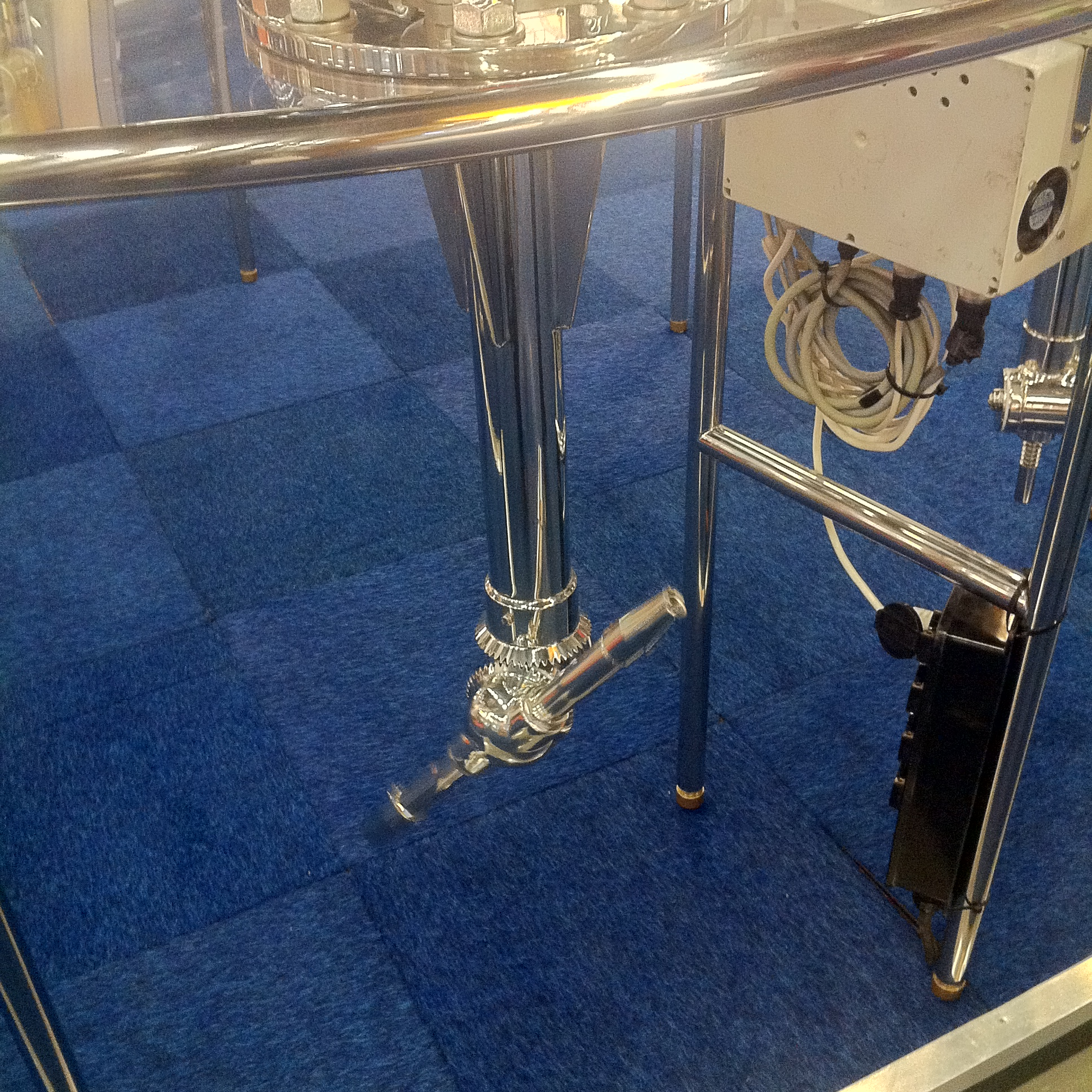 Gezien op Europort 2013 in Ahoy Rotterdam